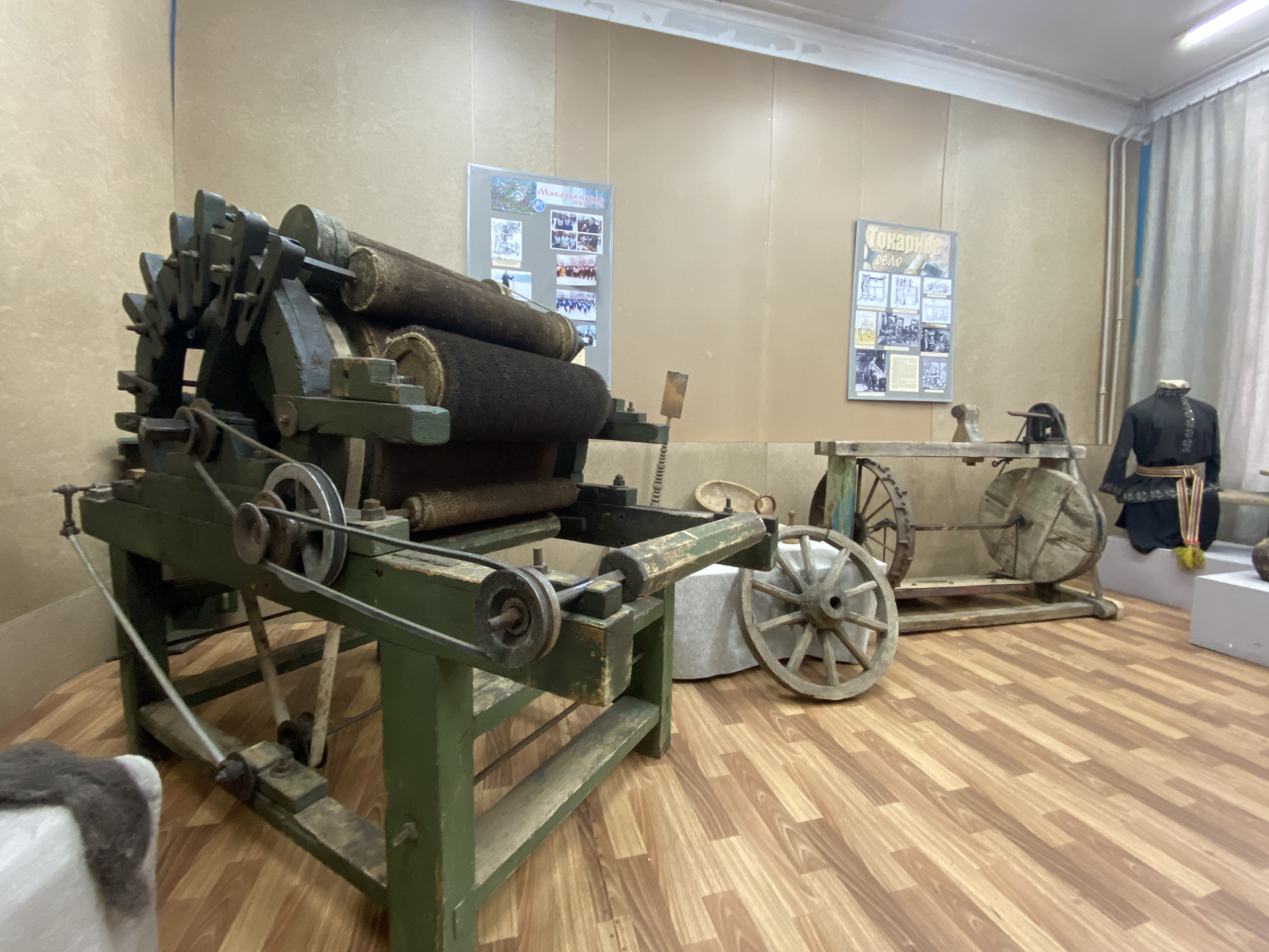 Шерстобитная машина макарьевская